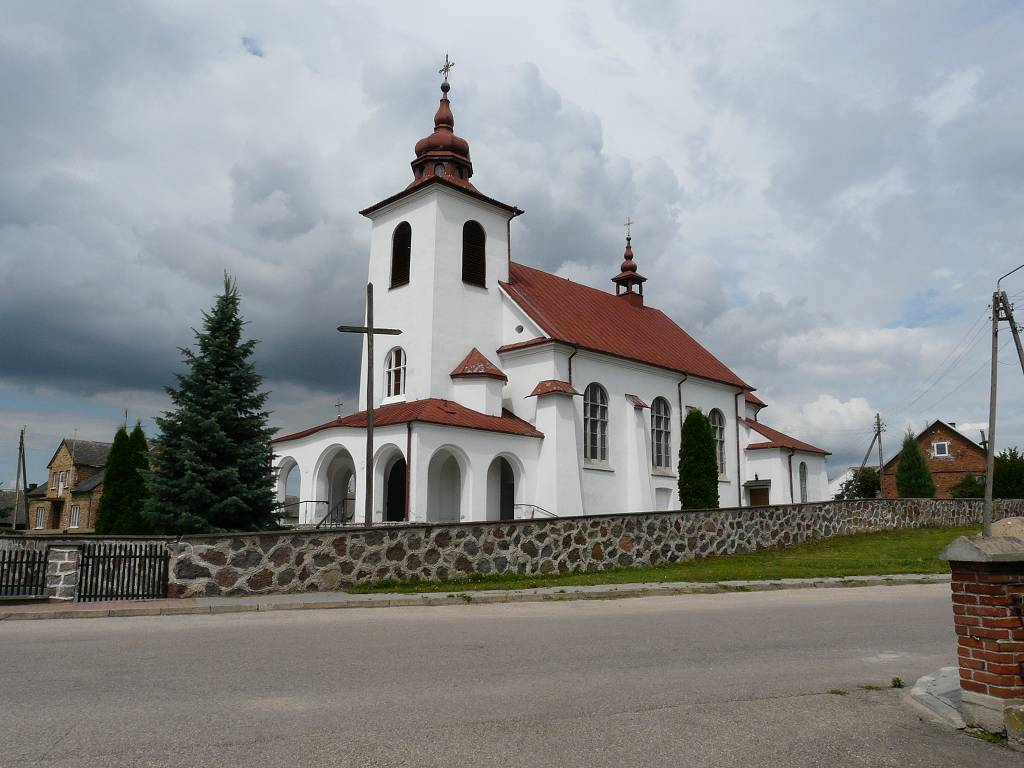 Kościół w Borkowie